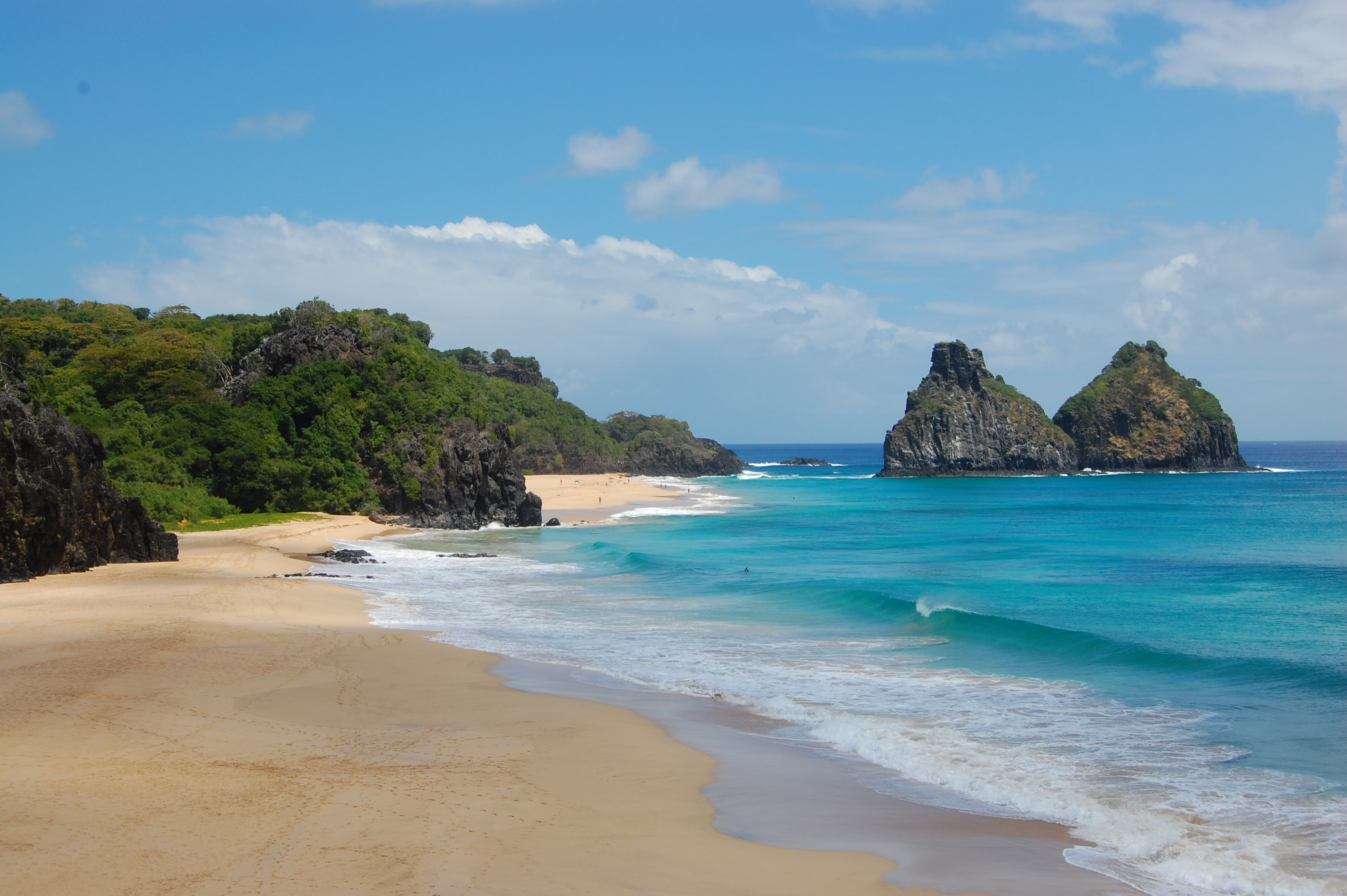 Morro dos Irmão, Fernando de Noronha, Brasil.